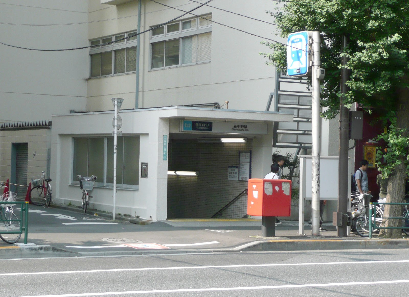 新中野駅2番出入口